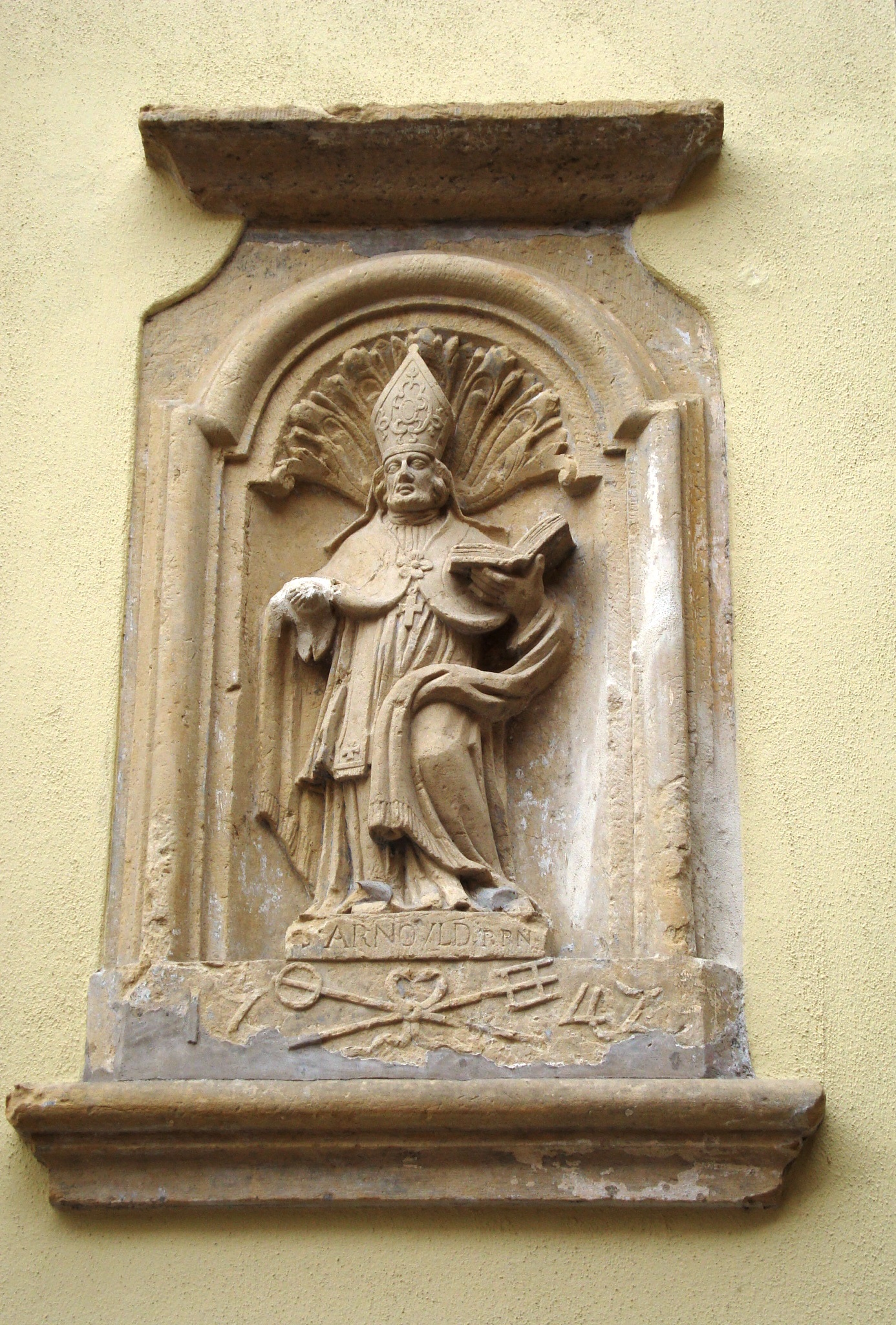 Statue de Saint Arnould, saint patron des brasseurs (à l'entrée des Rives de Clausen).